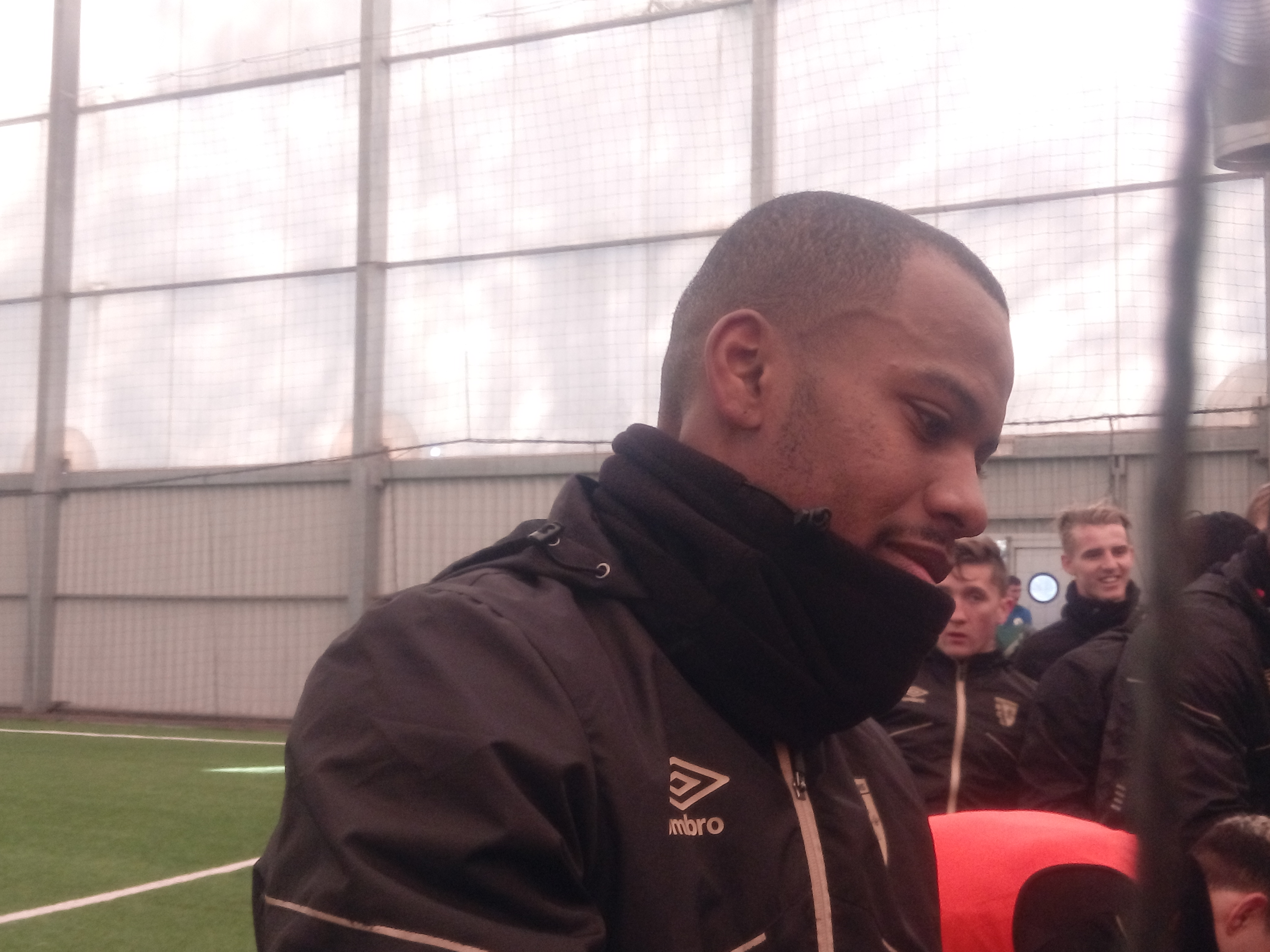 Kévin Fortuné lors d'un entraînement public du Racing Club de Lens, au Centre Technique et Sportif de La Gaillette, à Avion, le 6 janvier 2017.